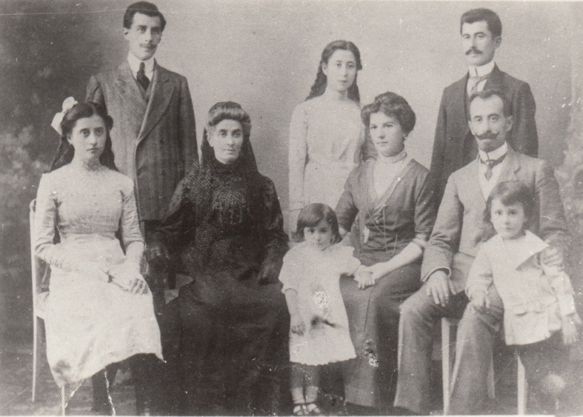 Тъпкови в Солун 1911. Прави: Благой, Глория, Кирил; Седнали: Христина, Василка, Олга с Аличка, Драган с Димитър.